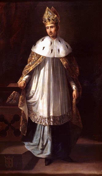 Retrato imaginario del rey Ramiro II de Aragón (1086-1157), que fue hijo del rey Sancho Ramírez de Aragón y de su segunda esposa, la reina Felicia de Roucy.